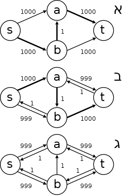 תיאור רשת זרימה שאלגוריתם פורד פולקרסון עלול לפעול עליה בצורה לא יעילה, מעשה ידי בעזרת התוכנה DIA.